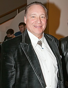 Максим Дунаевский на премьере мюзикла «Алые Паруса» 17 октября 2013 года.